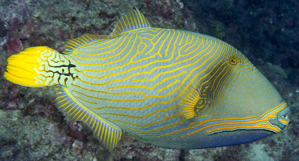 Un baliste strié (Balistapus undulatus) à la Réunion.